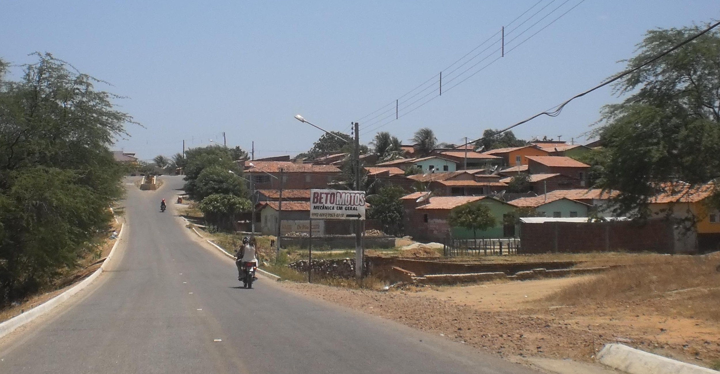 Entrada do bairro São Geraldo, localizado em Pau dos Ferros, estado do Rio Grande do Norte, Brasil.